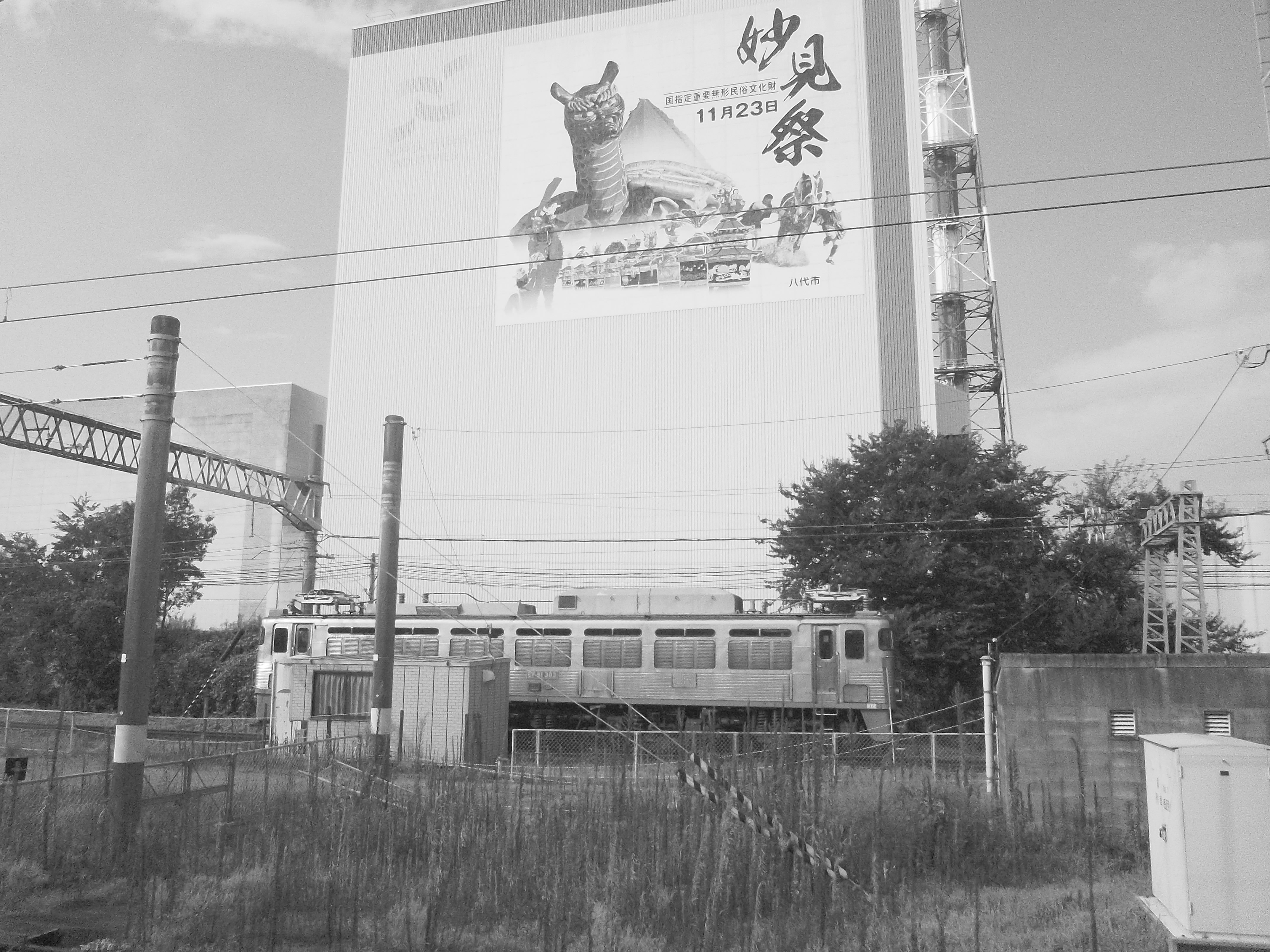 熊本県、八代駅の貨物側線にEF81 303が停車していたため撮影